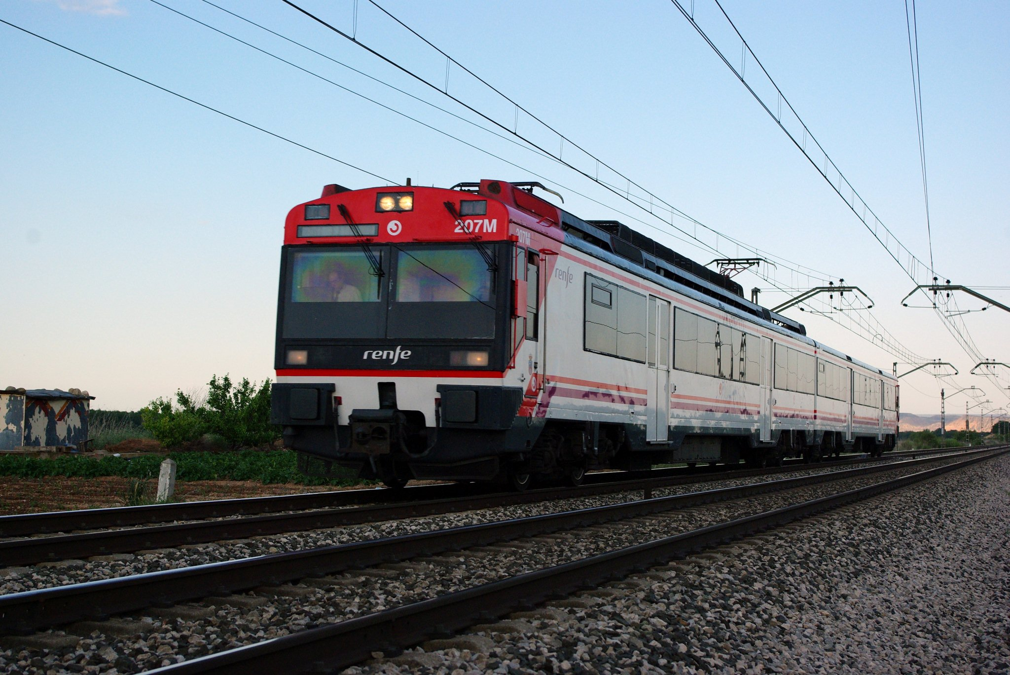 La 440-207 de 2 coches efectua un regional en el valle del Ebro con los últimos rayos de luz del dia